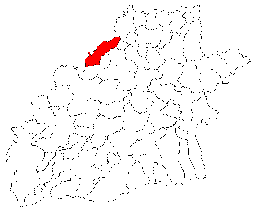 Categorie:Hărţi ale judeţului Sibiu